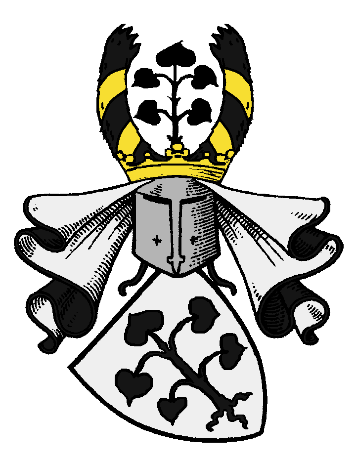 Wappen der von Hettersdorf(f)